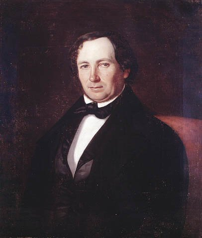 Portrait en buste de John Kane (La Baie-Saguenay, P.Q.)